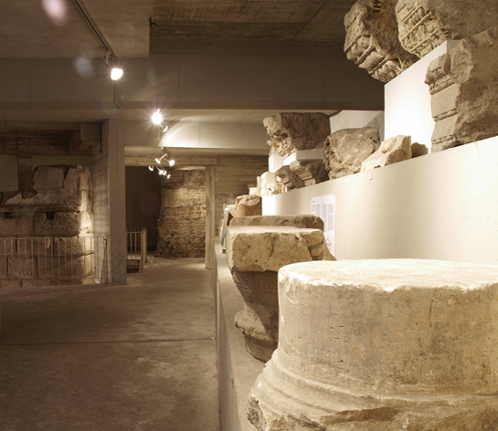 Das Uberiemonument der Archäologischen Zone Köln